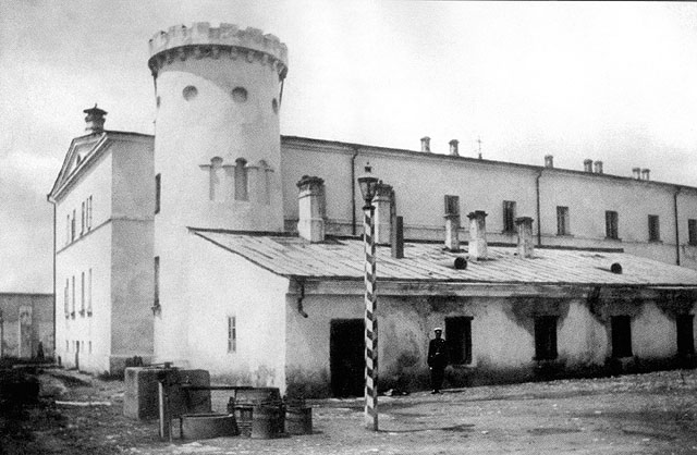 Butyrskaya Prison, Moscow, 1890s